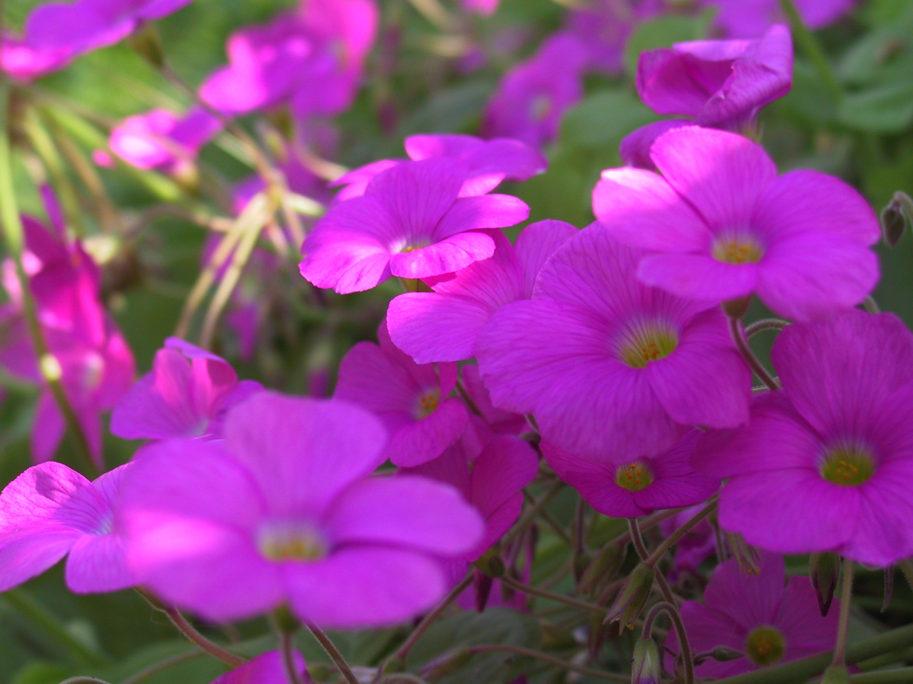 Oxalis